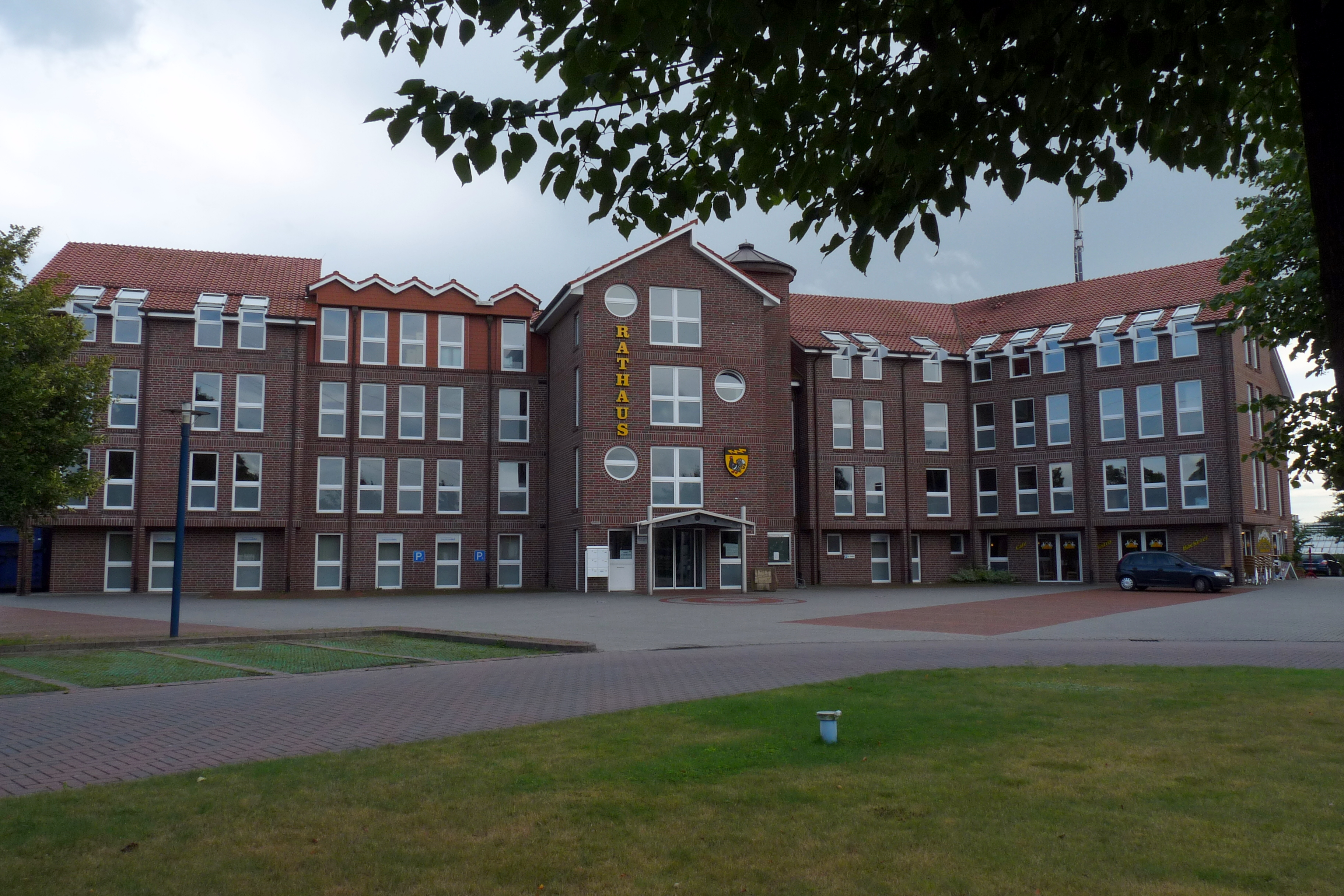 Das neue Rathaus in Wiesmoor